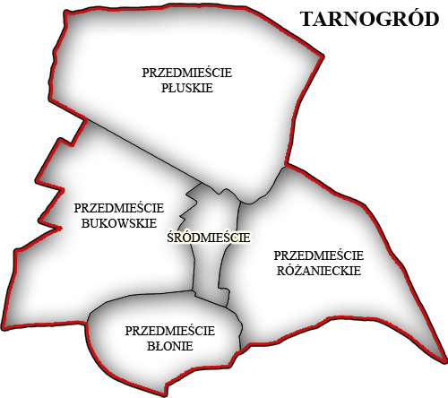 Tarnogród, Poland: Administrative City Map Tarnogród, Polska: Podział na dzielnice